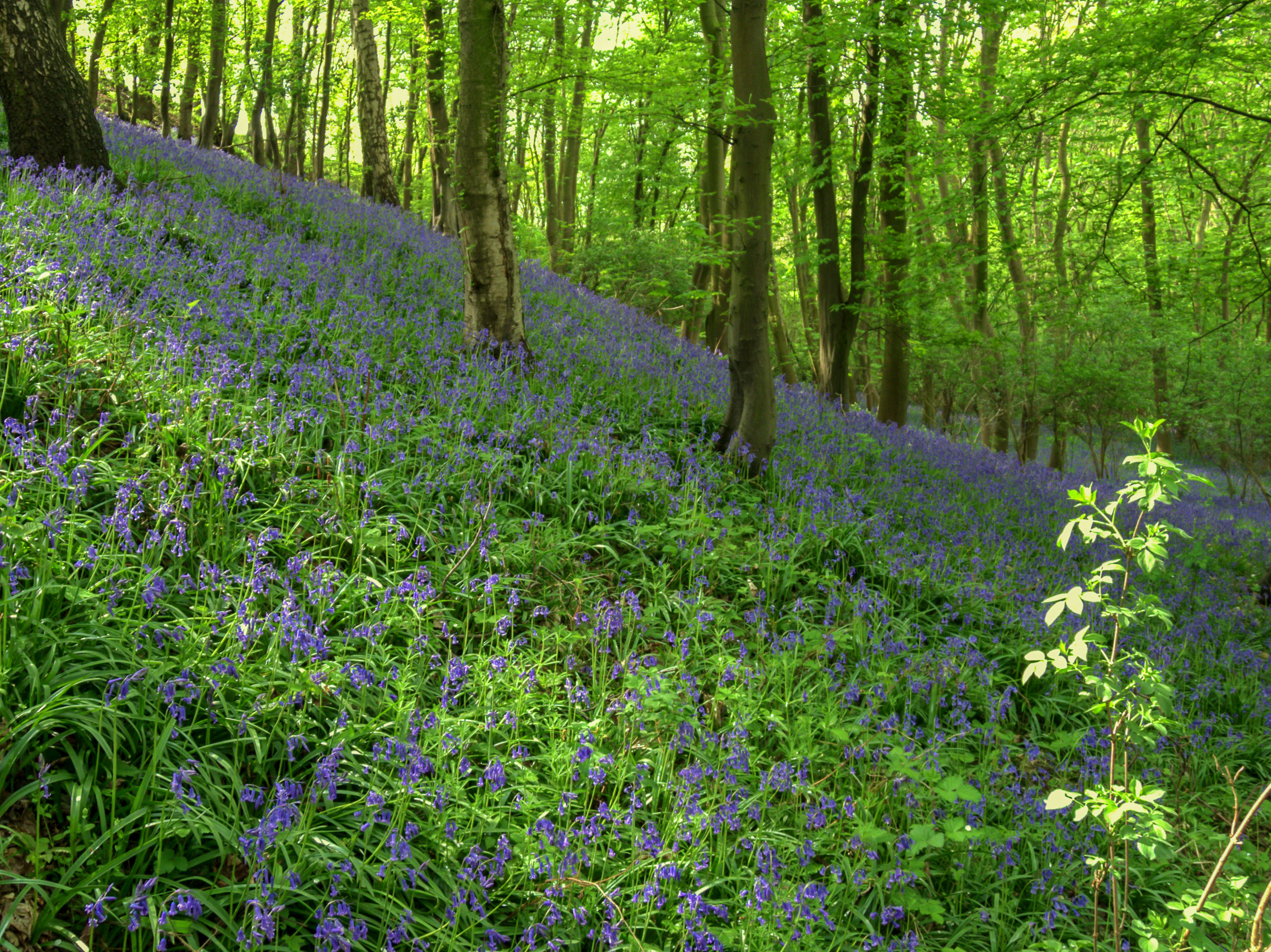 Hasenglöckchen (Hyacinthoides non-scripta) im Naturschutzgebiet „Gillenbusch“ (NSG DN-018) in Linnich, Kreis Düren, Nordrhein-Westfalen